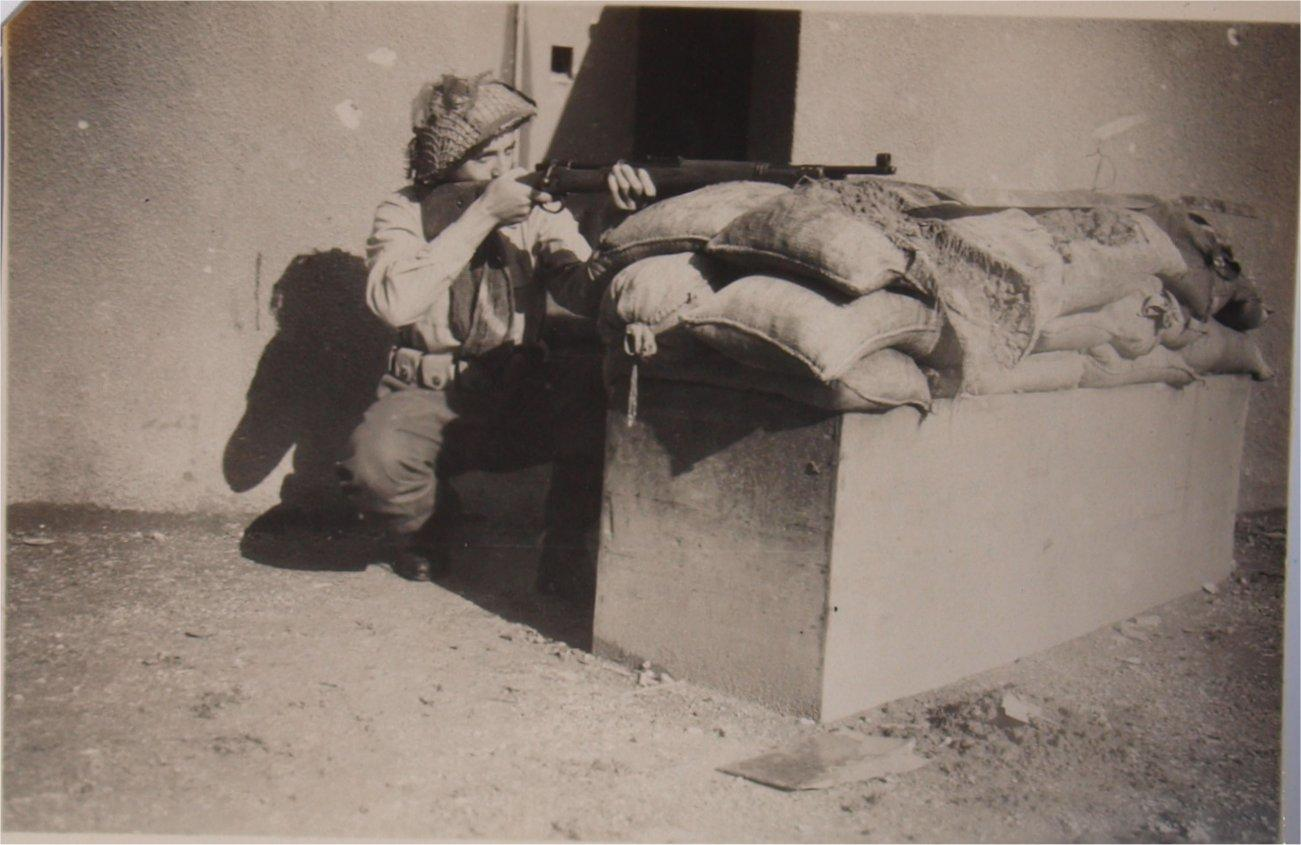 אבא באימון בדצבמר 1948